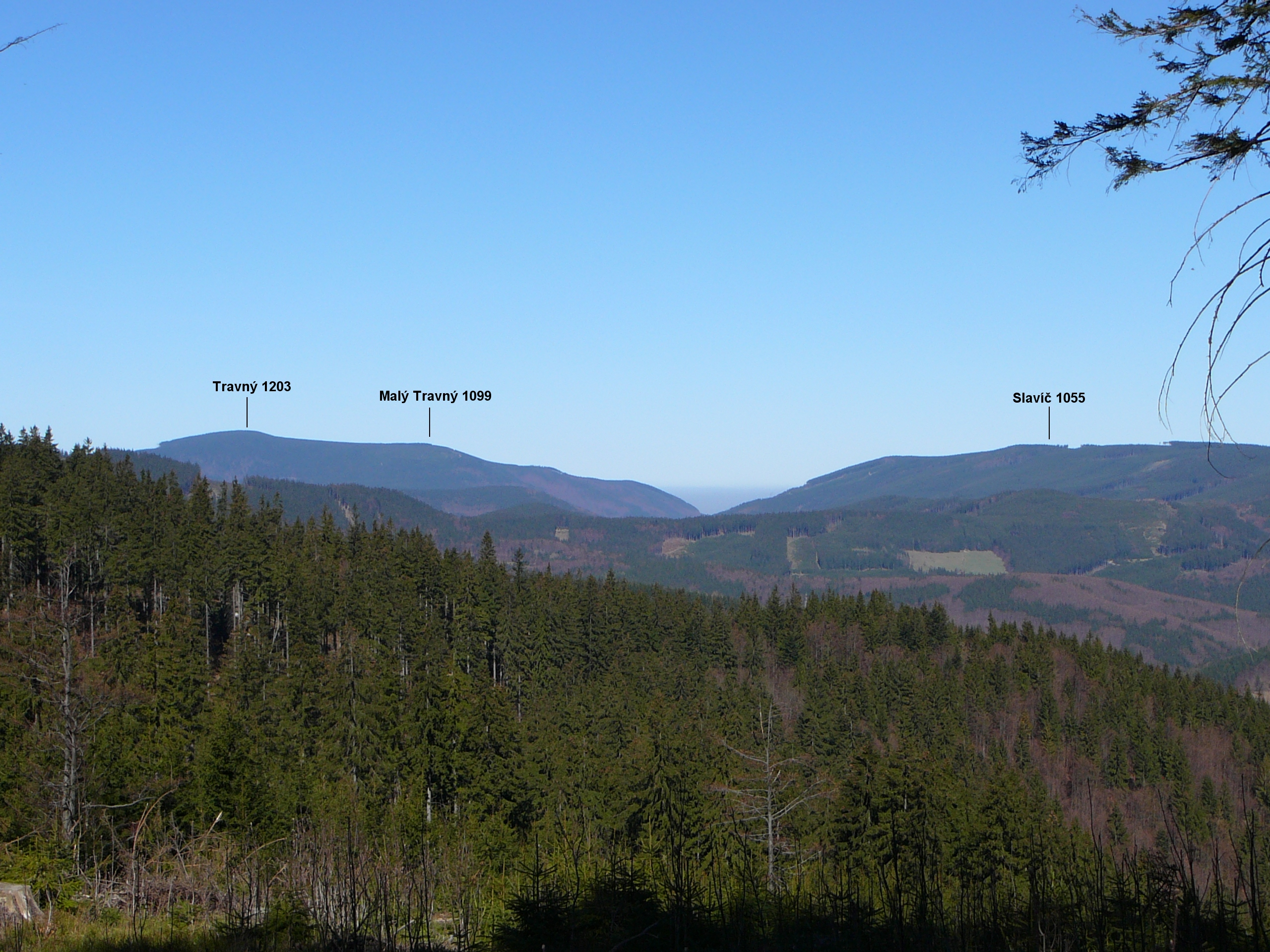 Pohled z Velkého Polomu (1067 m) na Travný a Slavíč